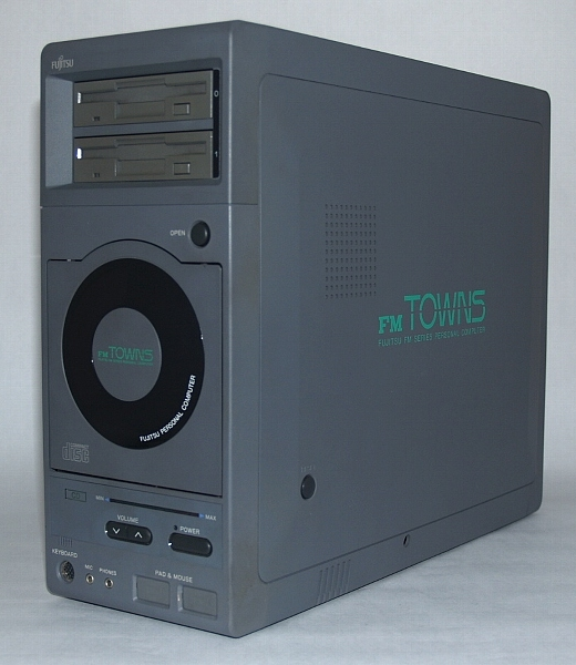 FMTOWNS model 2F